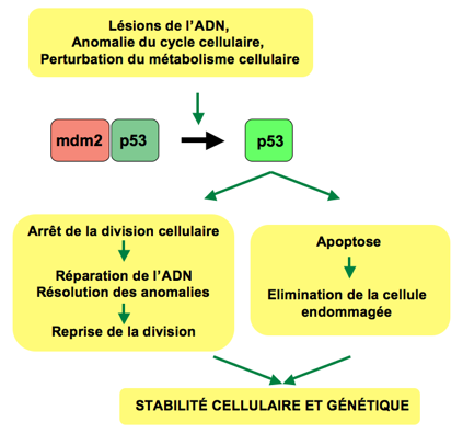 Signalisation p53